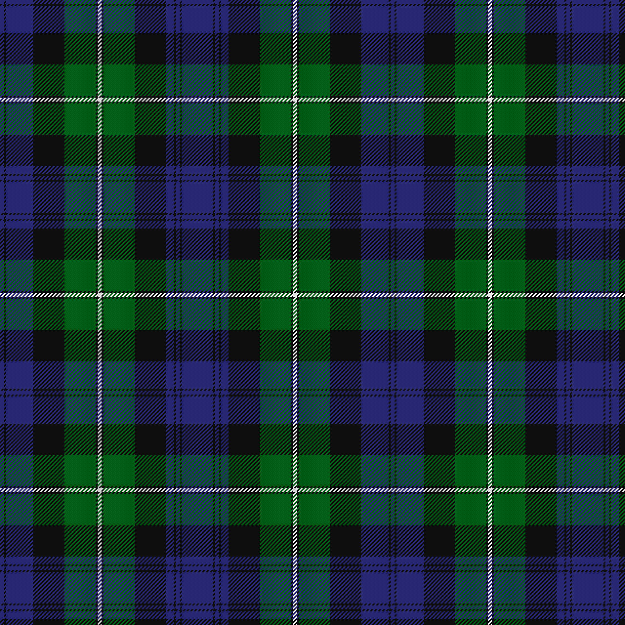 B/4 K2 B28 K32 G32 K2 W4 K2 G32 K32 B8 K2 B4 K2 B/32